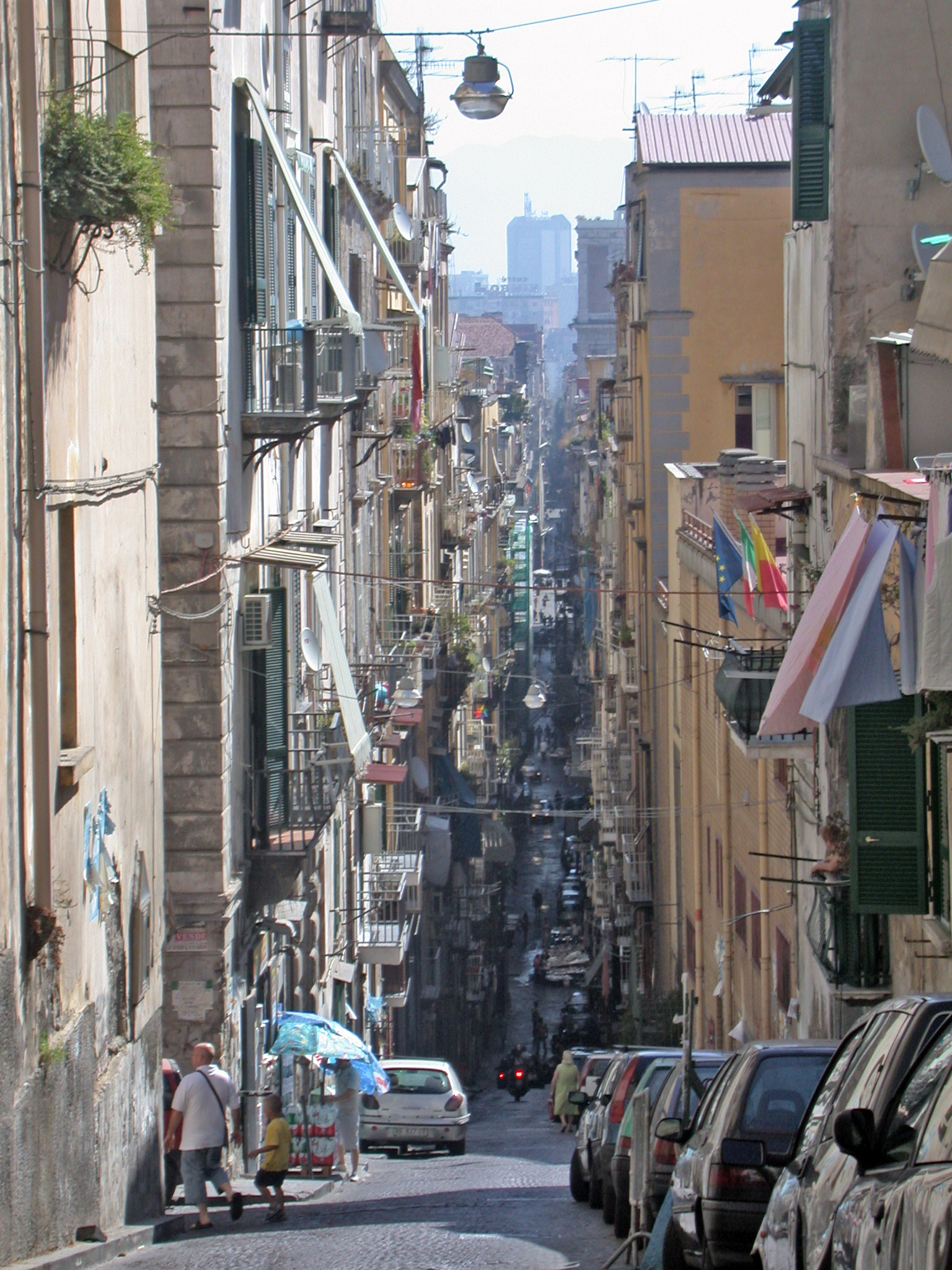 Italia, regione Campania, Napoli, Spaccanapoli.